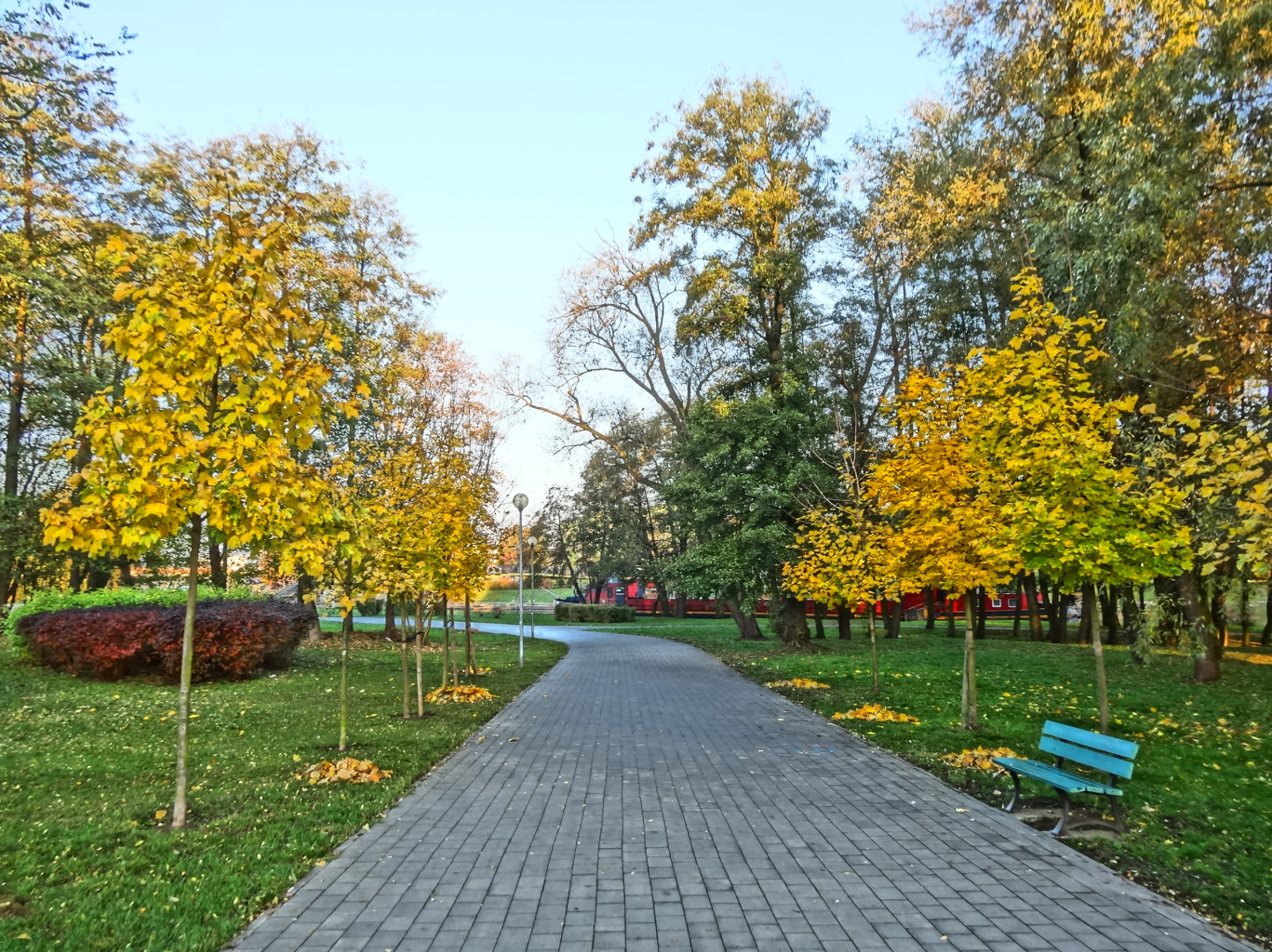 Park Centralny w Bydgoszczy nad Brdą